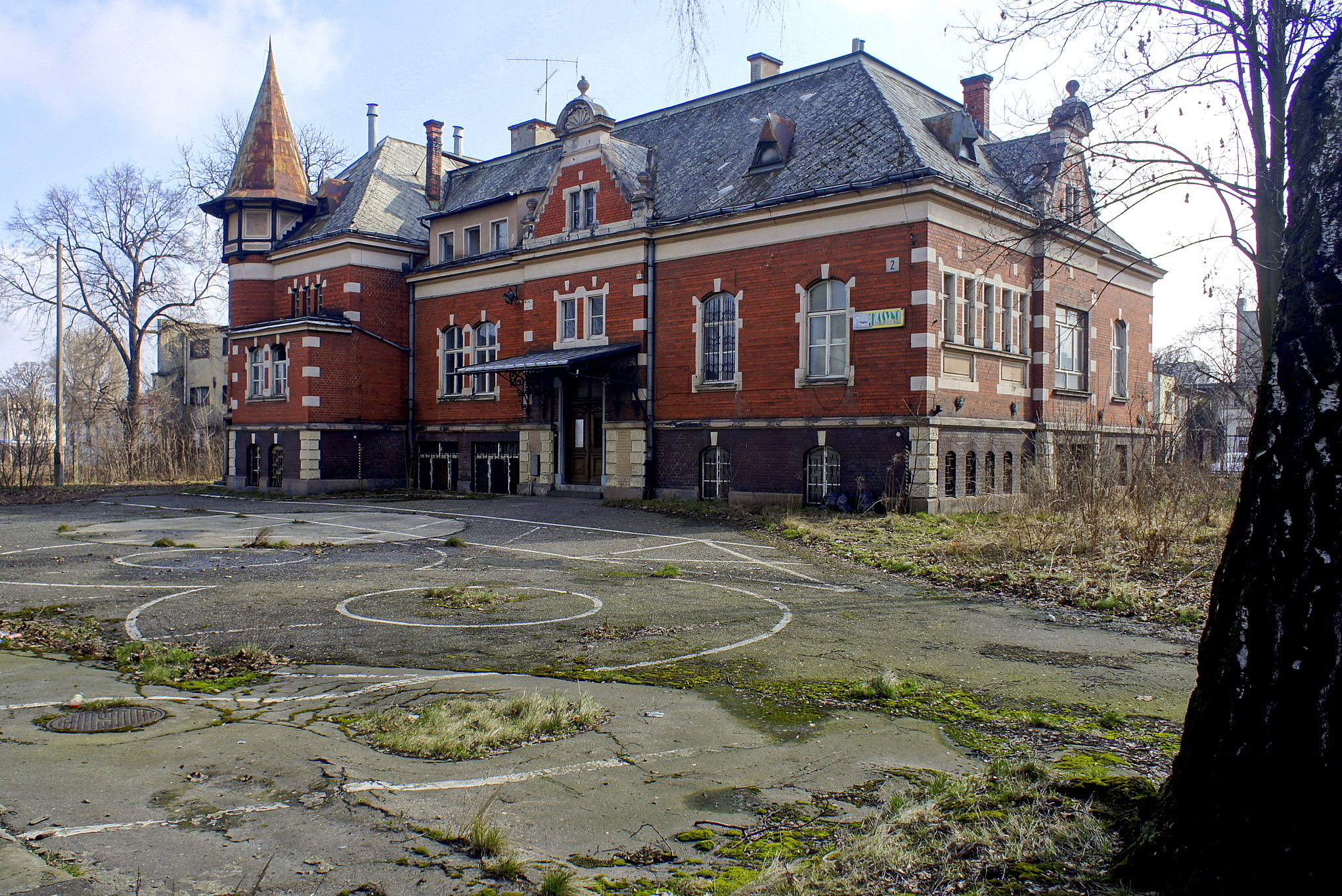 Ostrów Wlkp. Koszary Ułańskie przy ulicy Kolejowej, z lat 1897-1899 - Kasyno oficerskie. O kasynie tym pisał w swoich wspomnieniach Manfred von Richthofen służący w garnizonie ostrowskim w 1914 r.